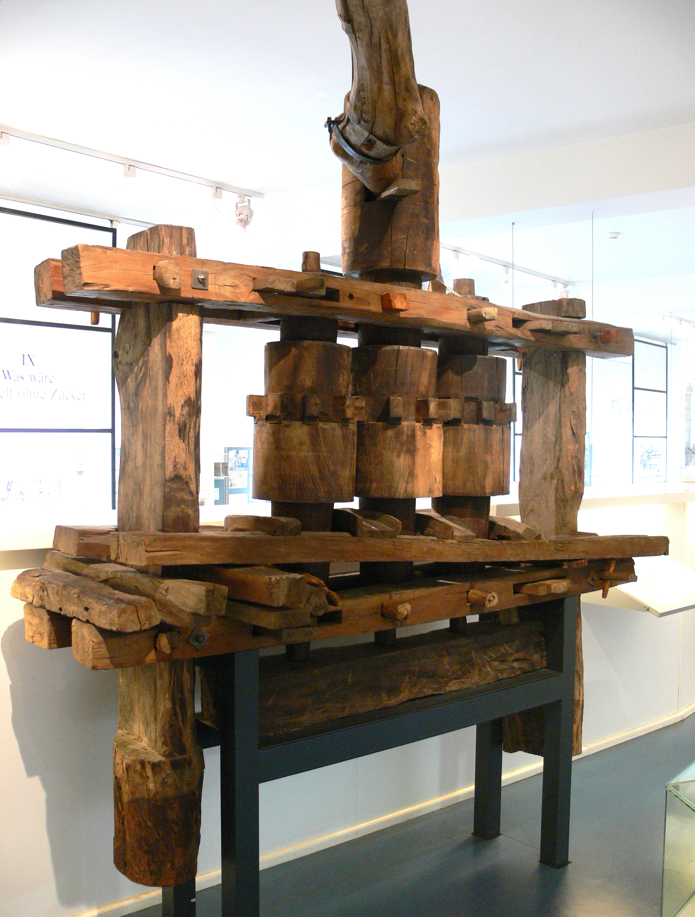 Drei-Walzen-Zuckermühle aus Bolivien Zucker-Museum, Berlin